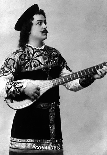 Леонид Собинов в роли Соловья Будимировича из оперы М.М. Иванова "Забава Путятишна".